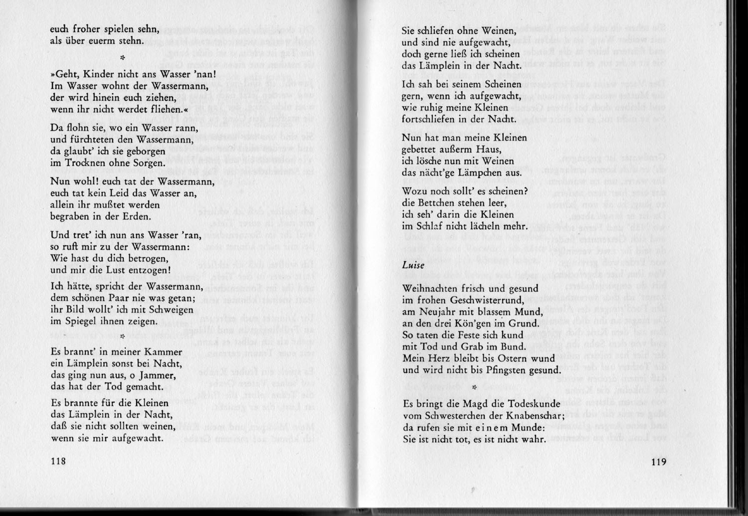 Kindertotenlieder